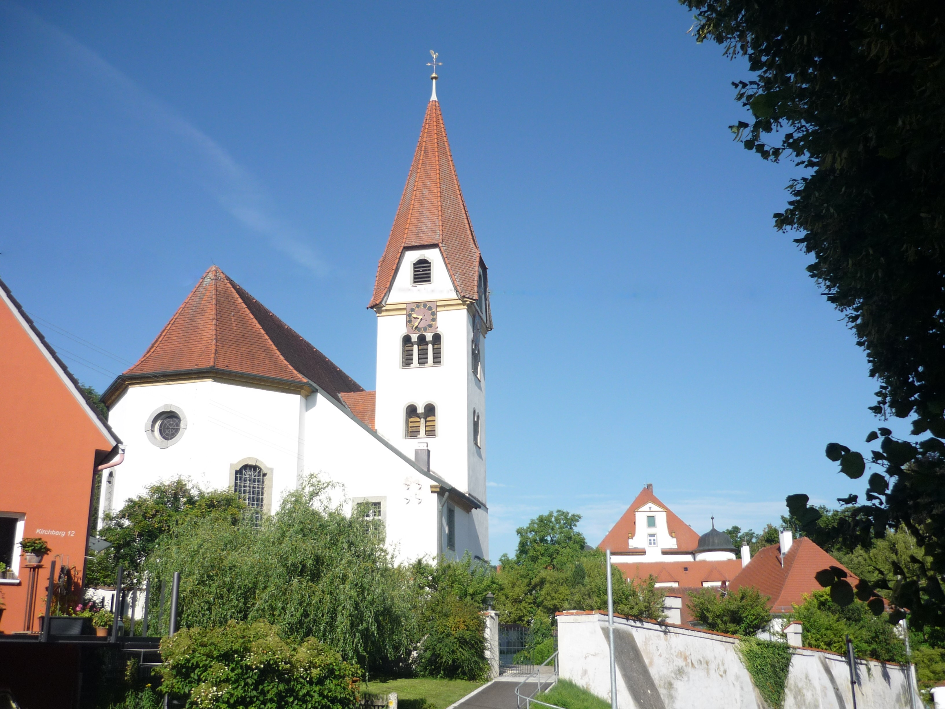 Pfarrkirche St.Georg